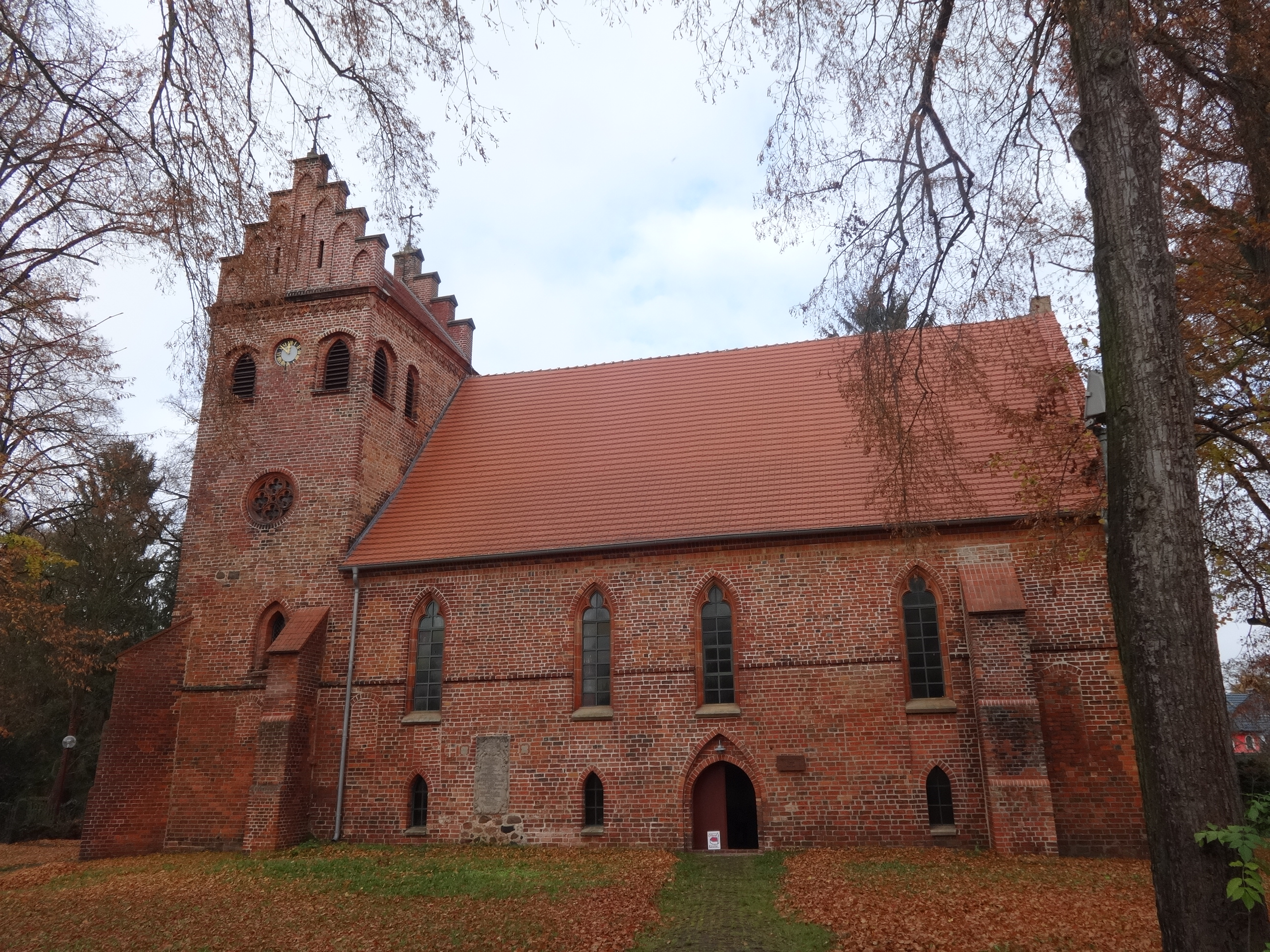 Die evangelische Heilig-Geist-Kirche ist ein Sakralbau aus dem späten 14. Jahrhundert. Sie befindet sich in Teupitz im Landkreis Dahme-Spreewald in Brandenburg. Im Innern befinden sich eine barocke Kanzel aus dem Jahr 1692 sowie eine Orgel von 1694.